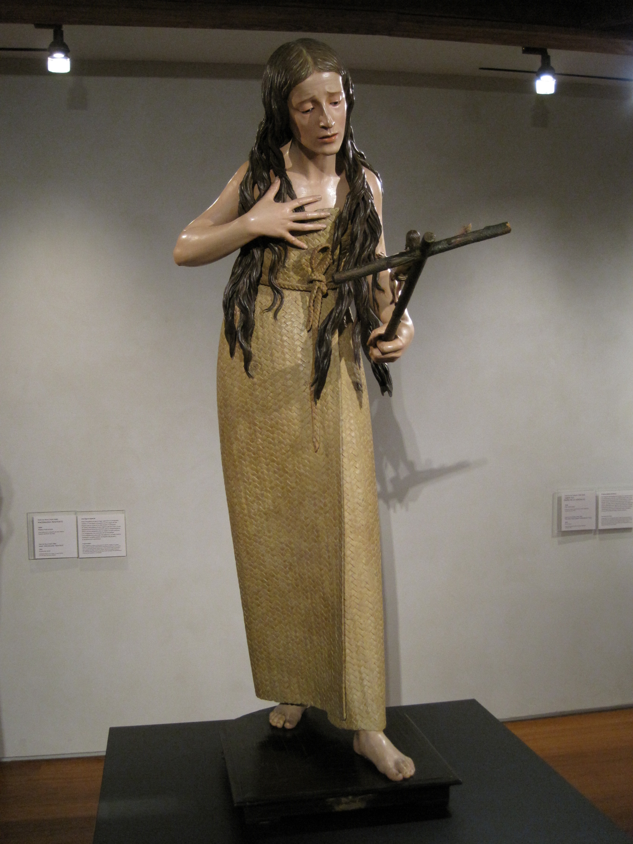 Magdalena penitente (1664), obra de Pedro de Mena. Procede de la Casa Profesa de la Compañía de Jesús en Madrid. Museo Nacional Colegio de San Gregorio (Valladolid, España).